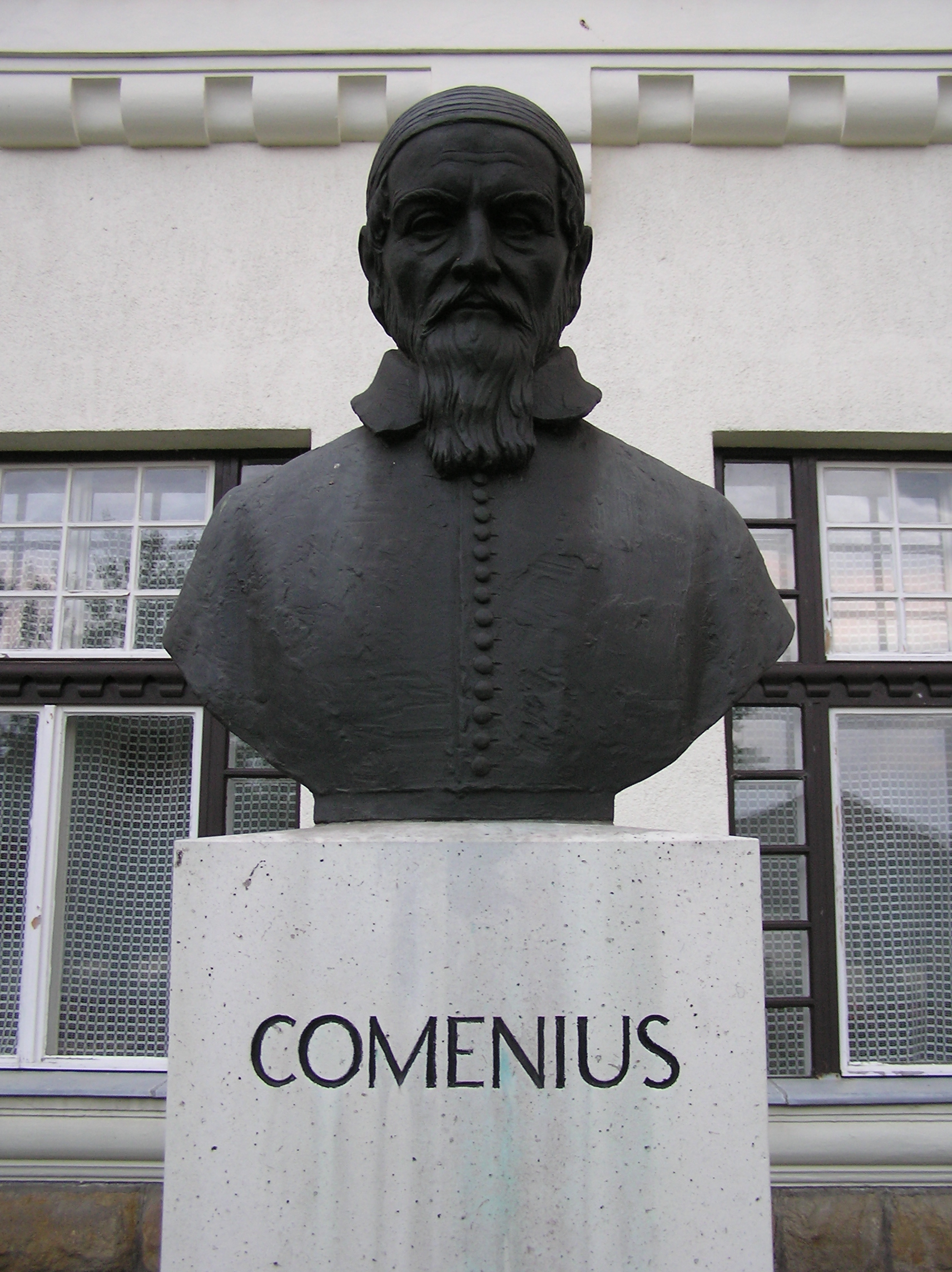 Busta Jana Amose Komenského v maďarském městě Sárospatak.